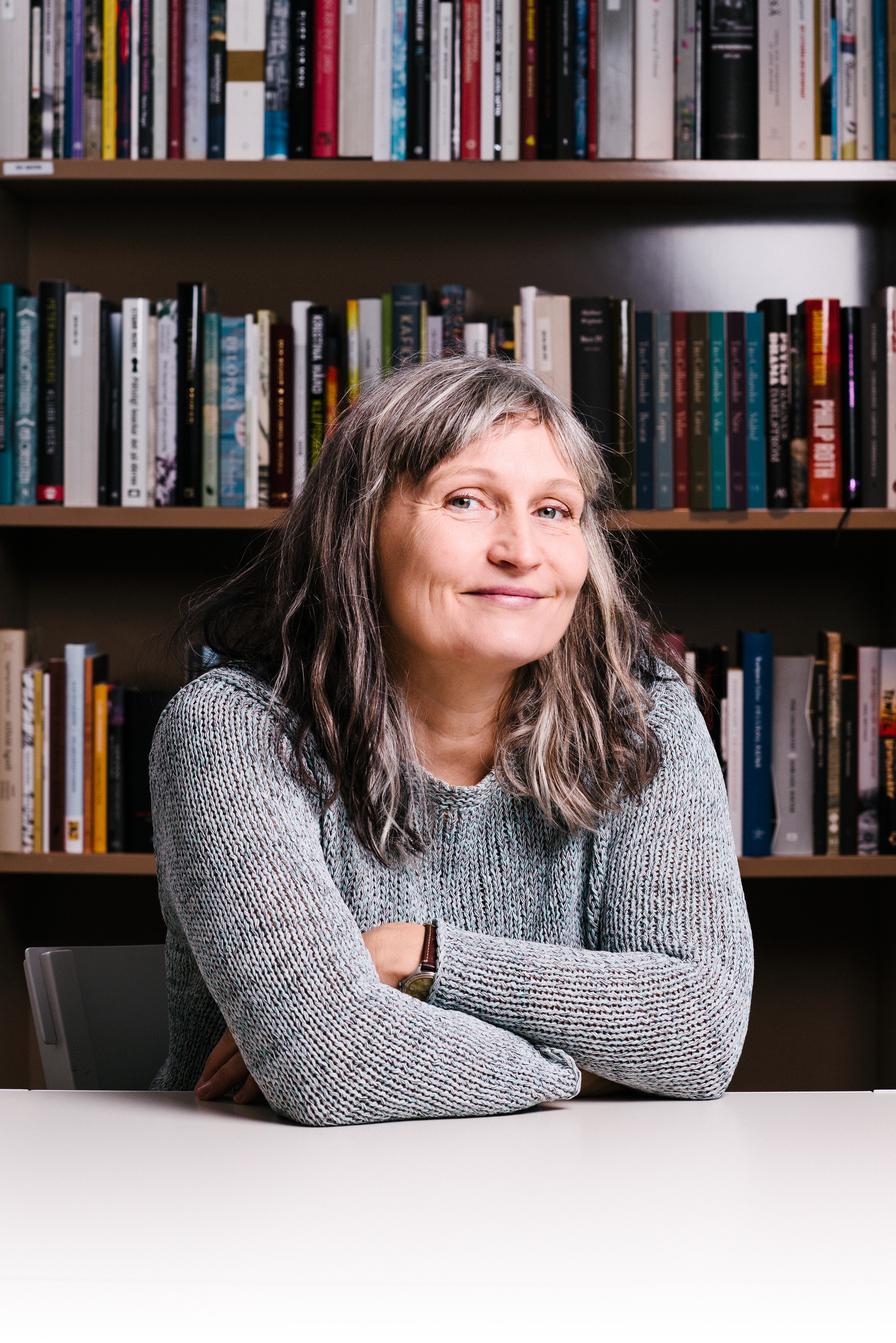 Författaren och illustratören Anna Höglund.